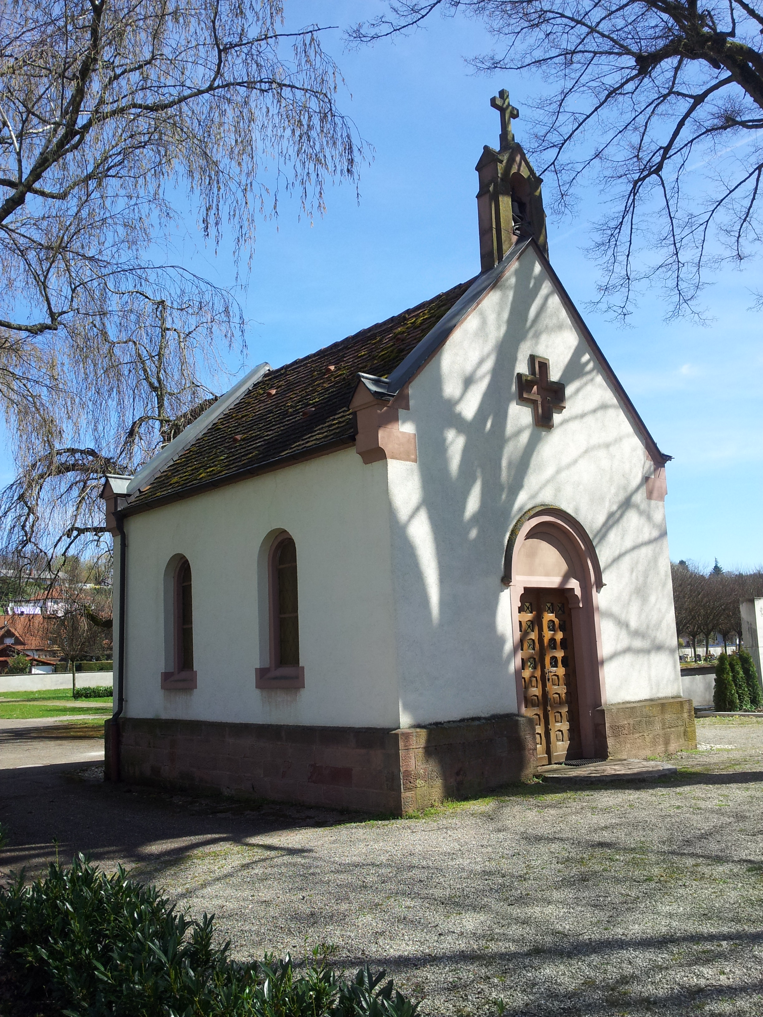 Alte Kapelle auf dem Friedhof in Kenzingen